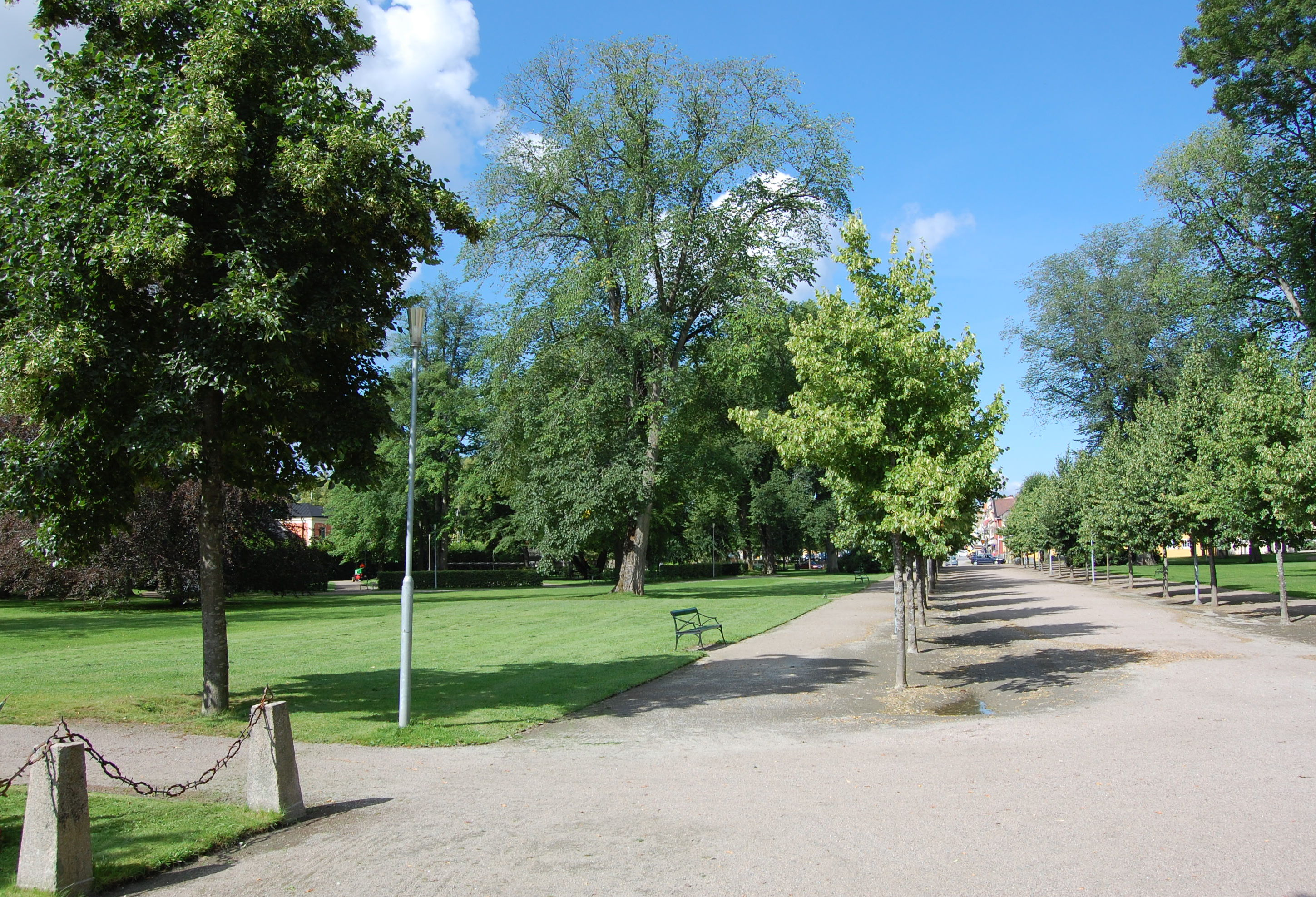 Linnepark in Växjö